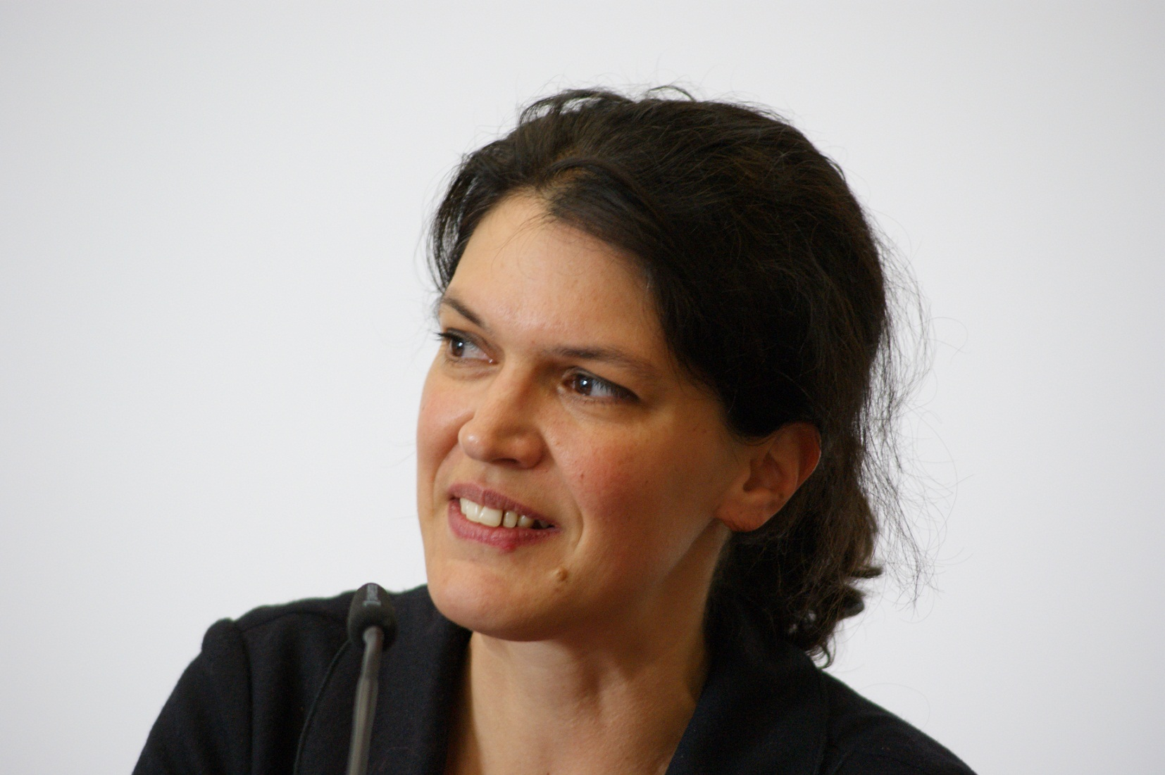 Ulrike Winkelmann bei einer öffentlichen Diskussion im April 2013